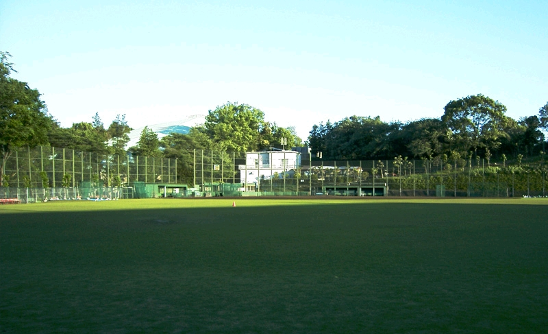 “Seibu_Stadium_No2” Goodwill Eastern League (Japanese baseball) professional baseball team located in Tokorozawa, Saitama, Japan. “西武第二球場” 日本の埼玉県所沢市にある屋外野球場。日本のプロ野球イースタン・リーグに加盟する、西武ライオンズ二軍のチーム・グットウィルのホーム球場でもある。西武ドームに隣接している野球場。また室内練習場はこの西武第二球場の敷地内に建てられている。